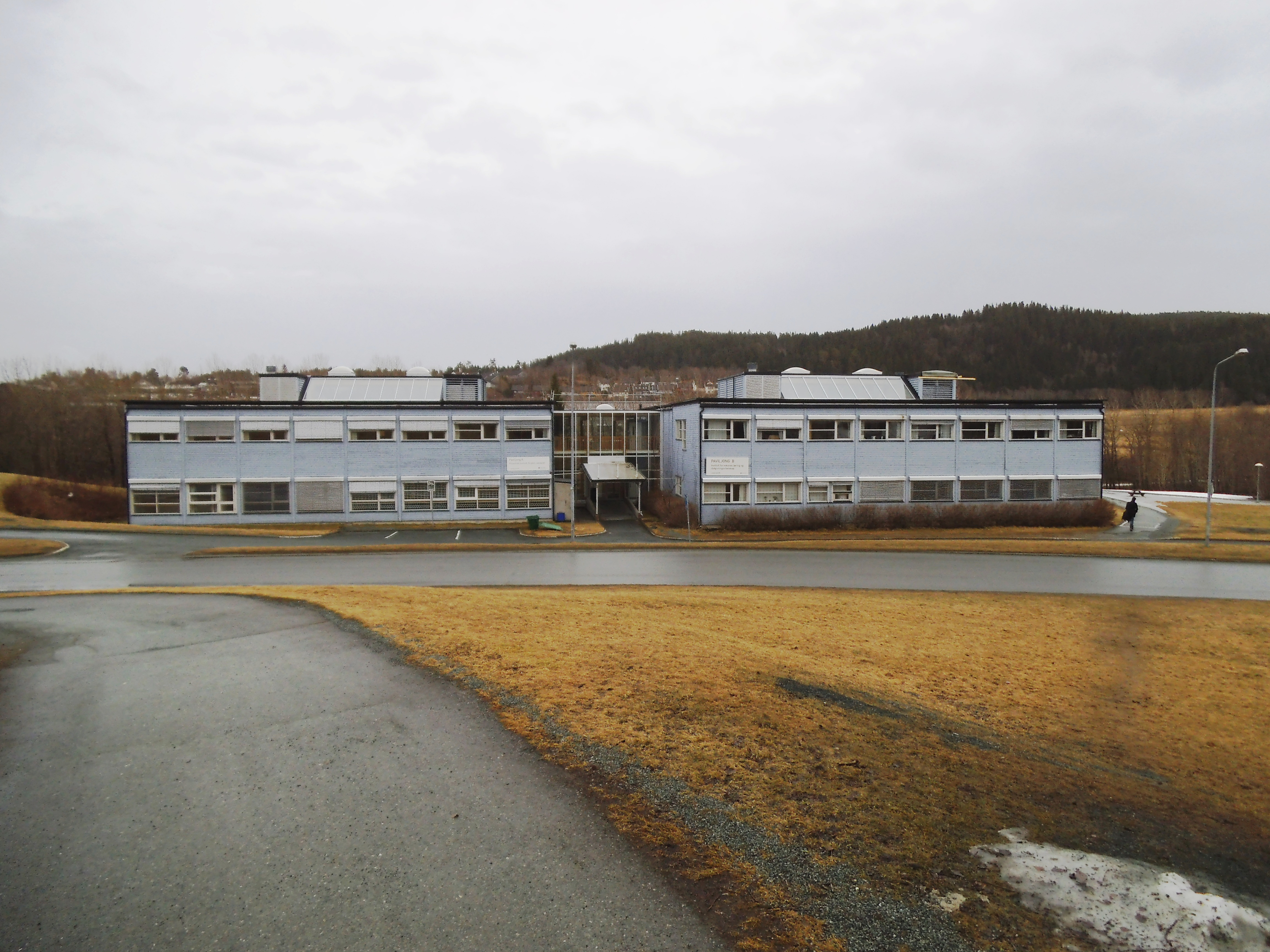 NTNU Dragvoll. Paviljong A og B som ligger like øst for hovedbygget.